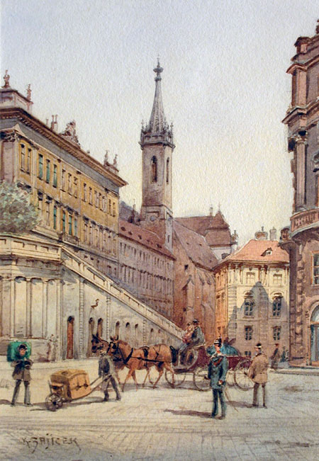 Blick auf die Albertina